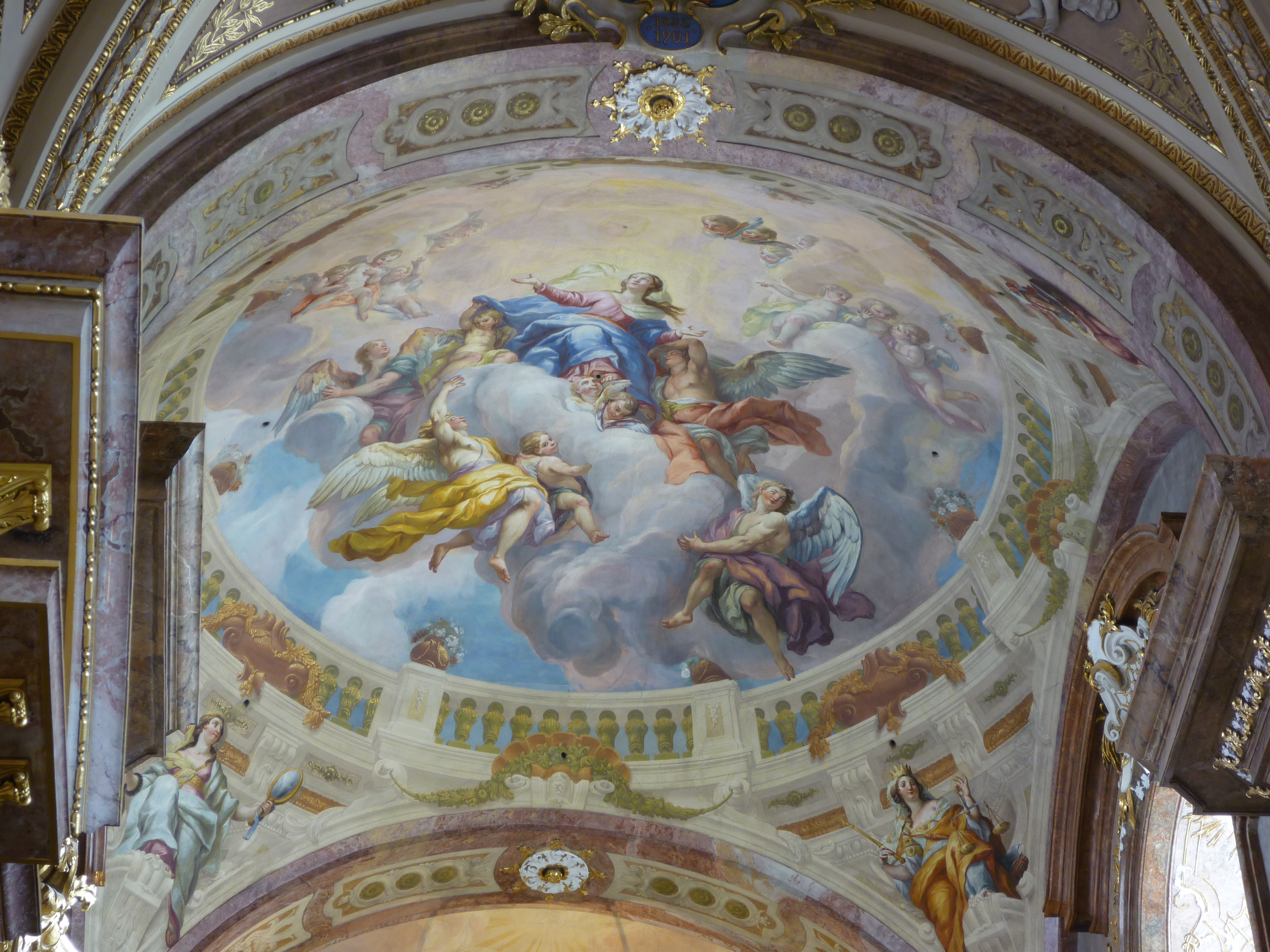 Kuppelfresko der Stiftskirche Klosterneuburg von Johann Michael Rottmayr (1729): Aufnahme Mariens in den Himmel